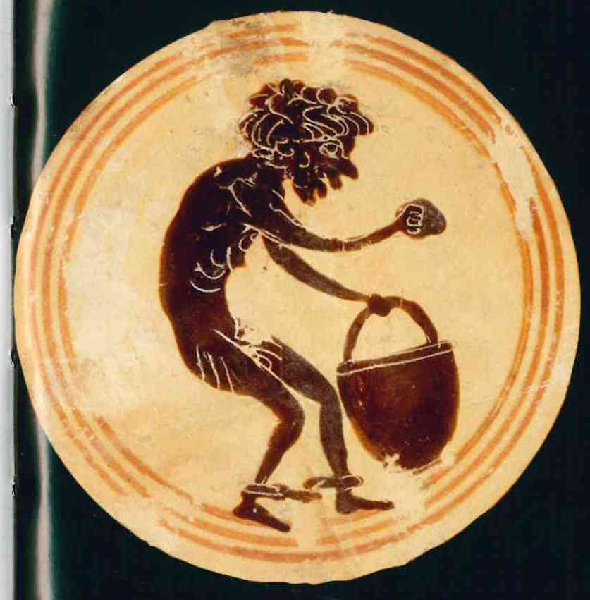 Esclave travaillant dans une mine. Détail d'un kylix à figures noires. Vers 490 av. J.C. Pièce visible au Rijksmuseum can Oudheden.